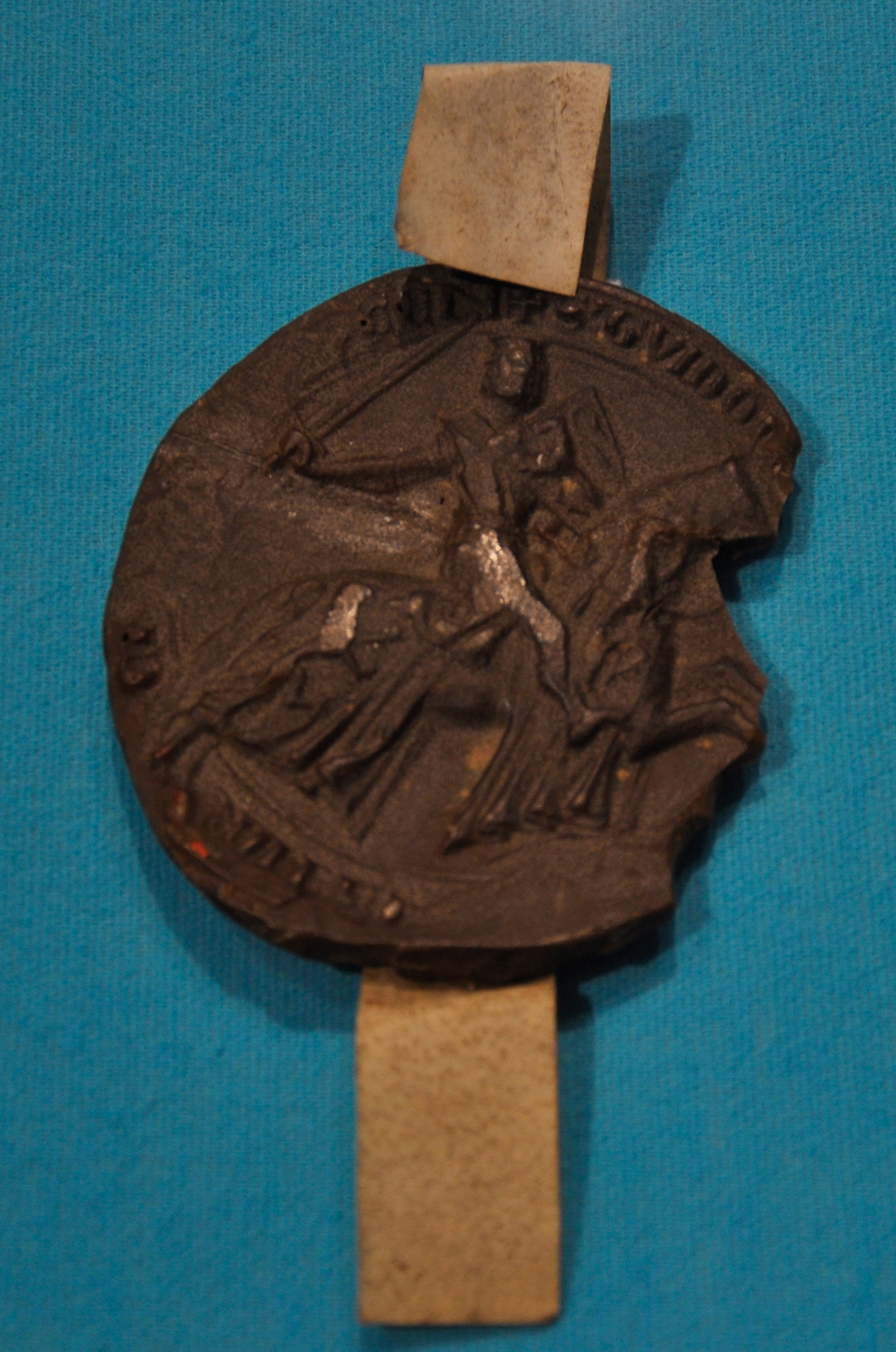 Ruiterzegel van Gwijde van Dampierre (ca. 1226-1305), in het Museum 1302 te Kortrijk, België